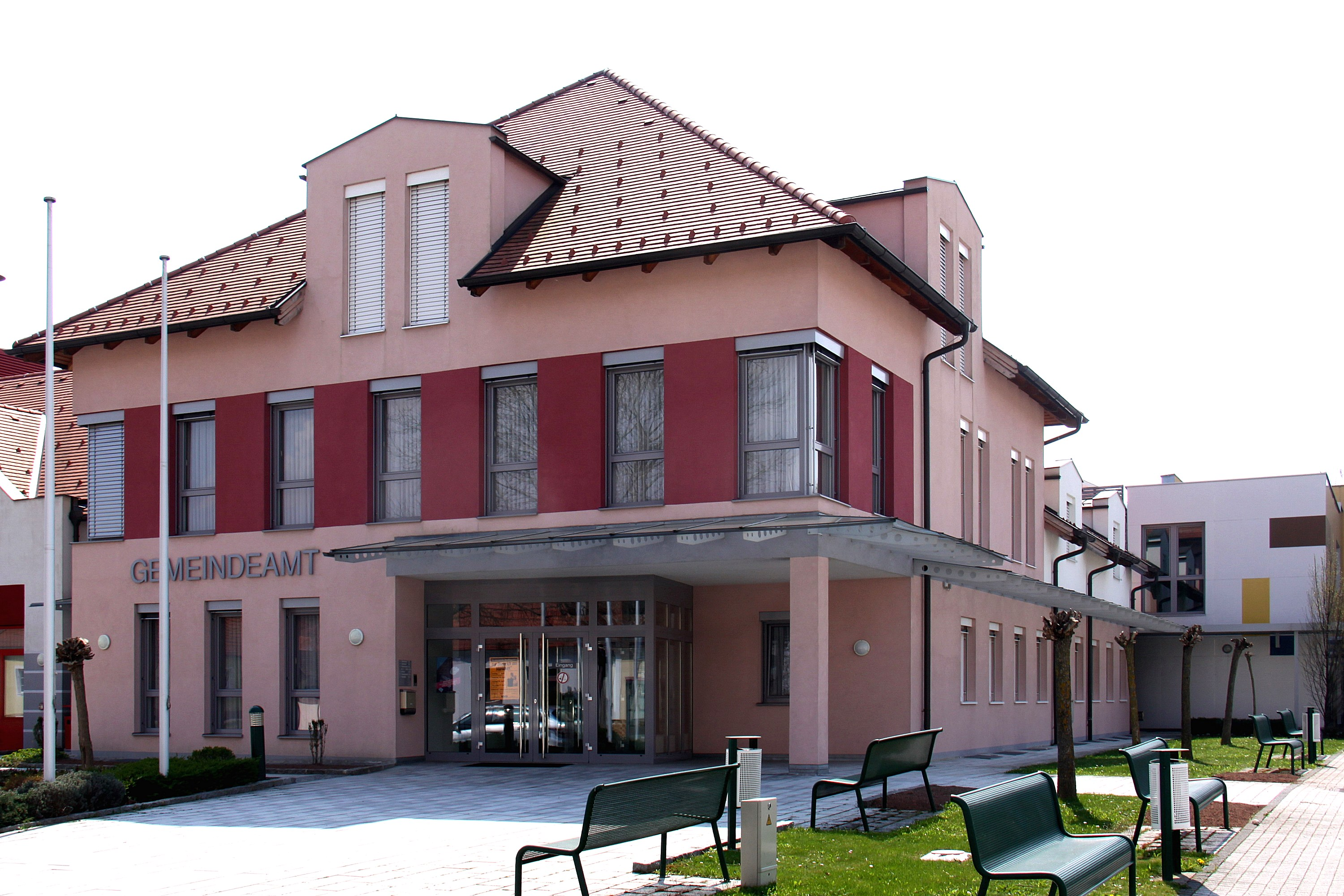 Riedlingsdorf - Gemeindeamt Object location47° 20′ 41.45″ N, 16° 08′ 11.16″ E